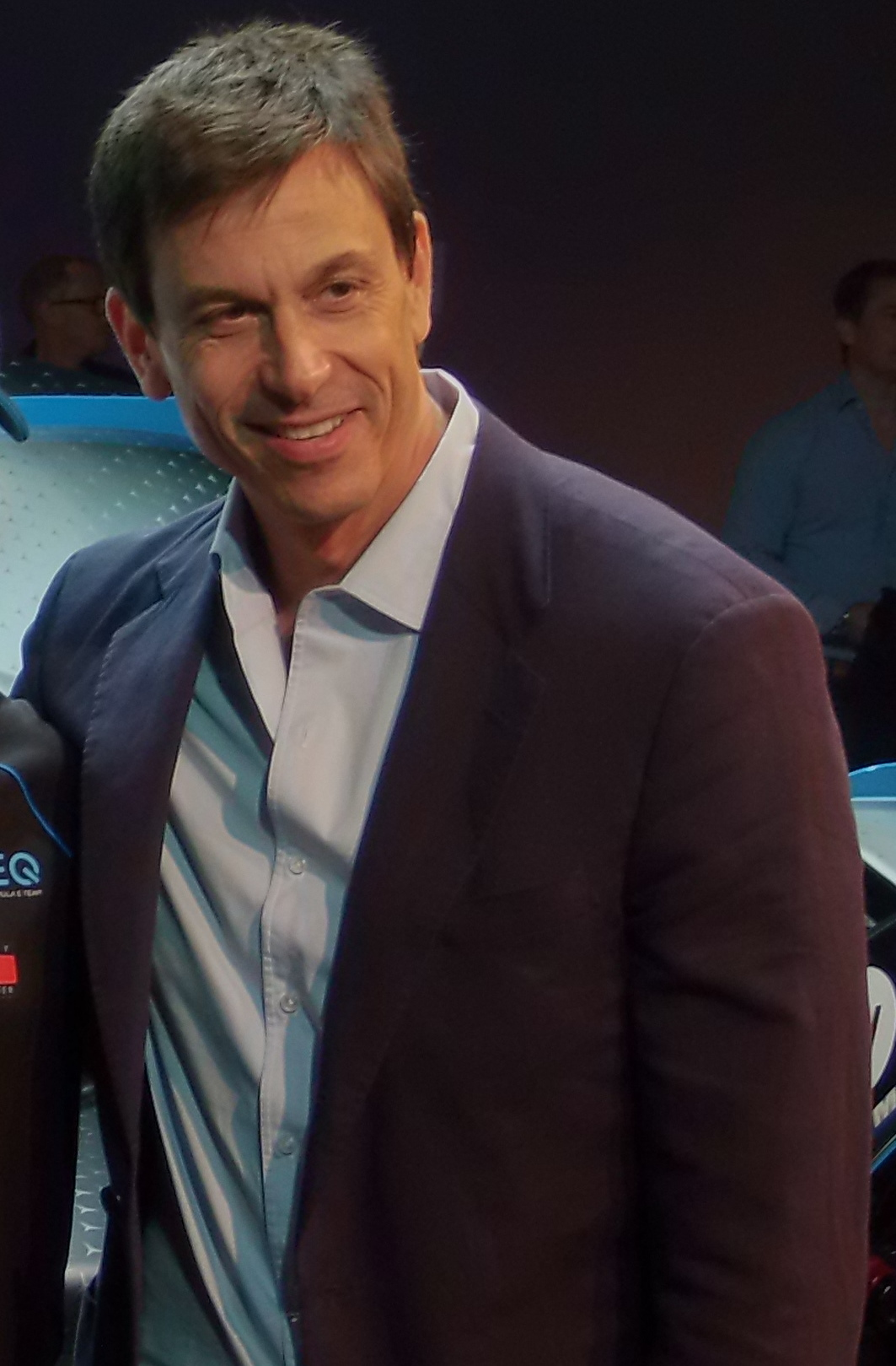 Ian James, Nyck de Vries, Stoffel Vandoorne und Toto Wolff bei der Teampräsentation des Mercedes-Benz EQ Formula E Teams auf der IAA 2019, im Hintergrund der Mercedes-Benz EQ Silver Arrow 01